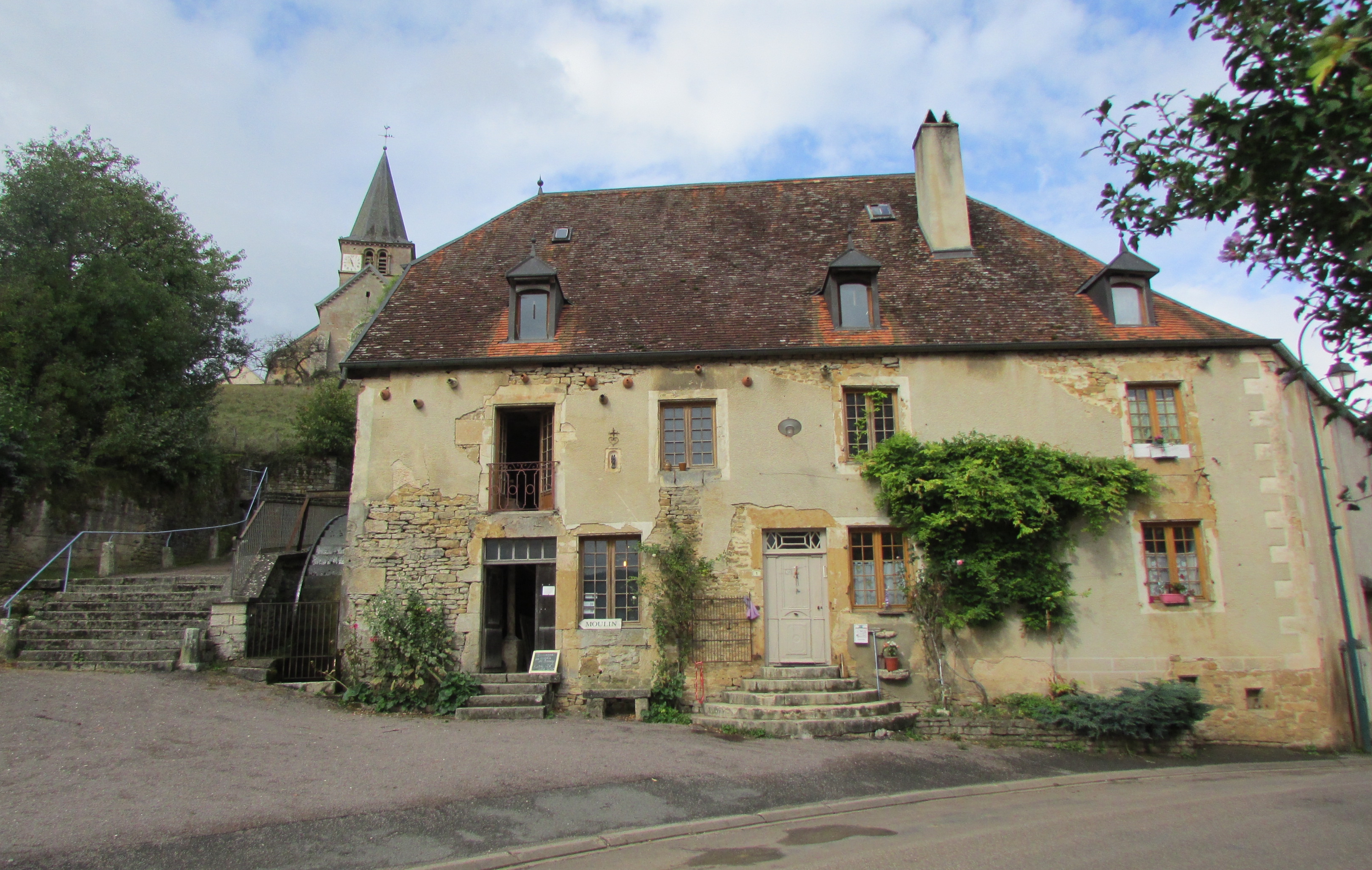 Le vieux moulin.